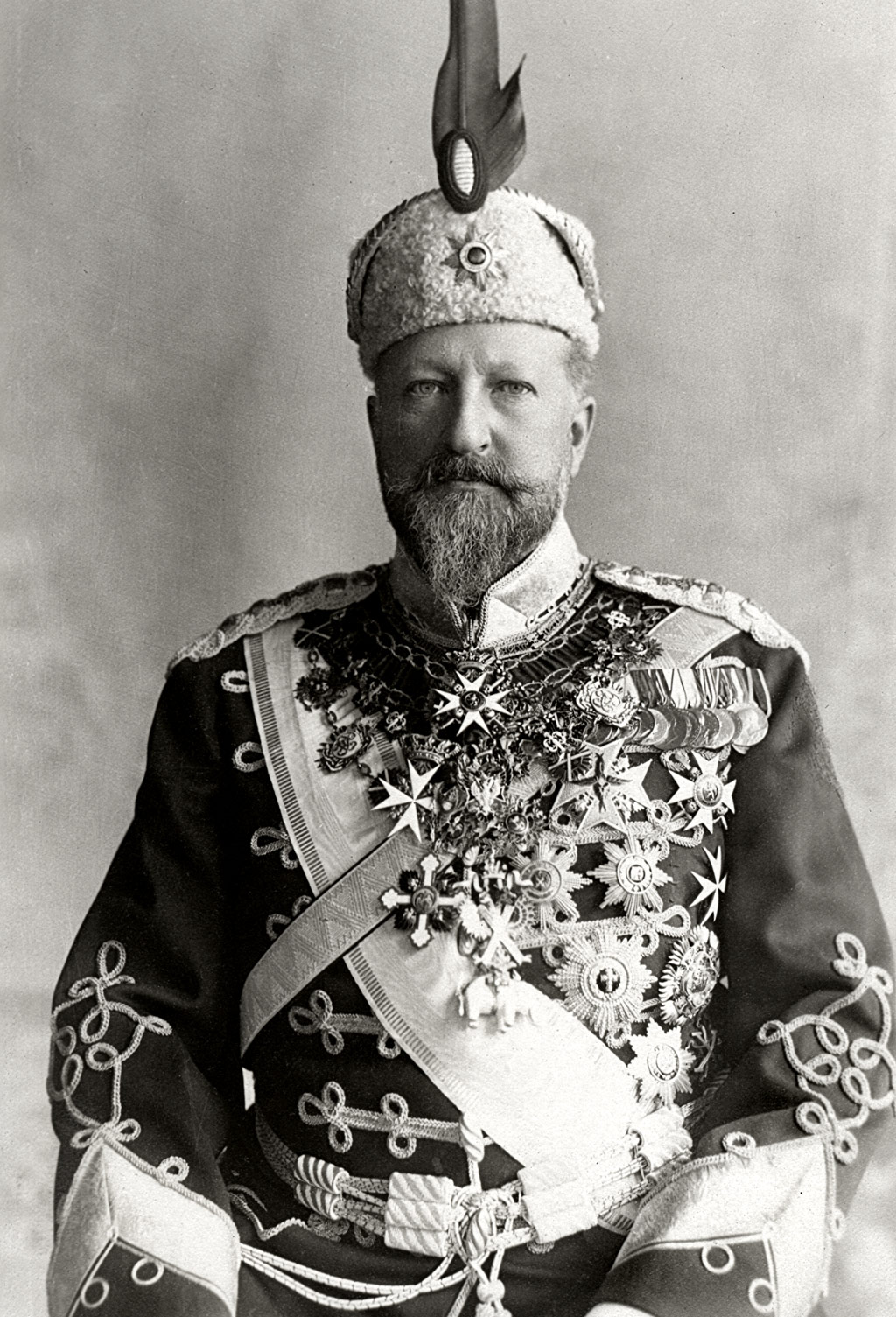 König Ferdinand in Guarde Uniform gekleidet, vermutlich während des Ersten Balkankrieg